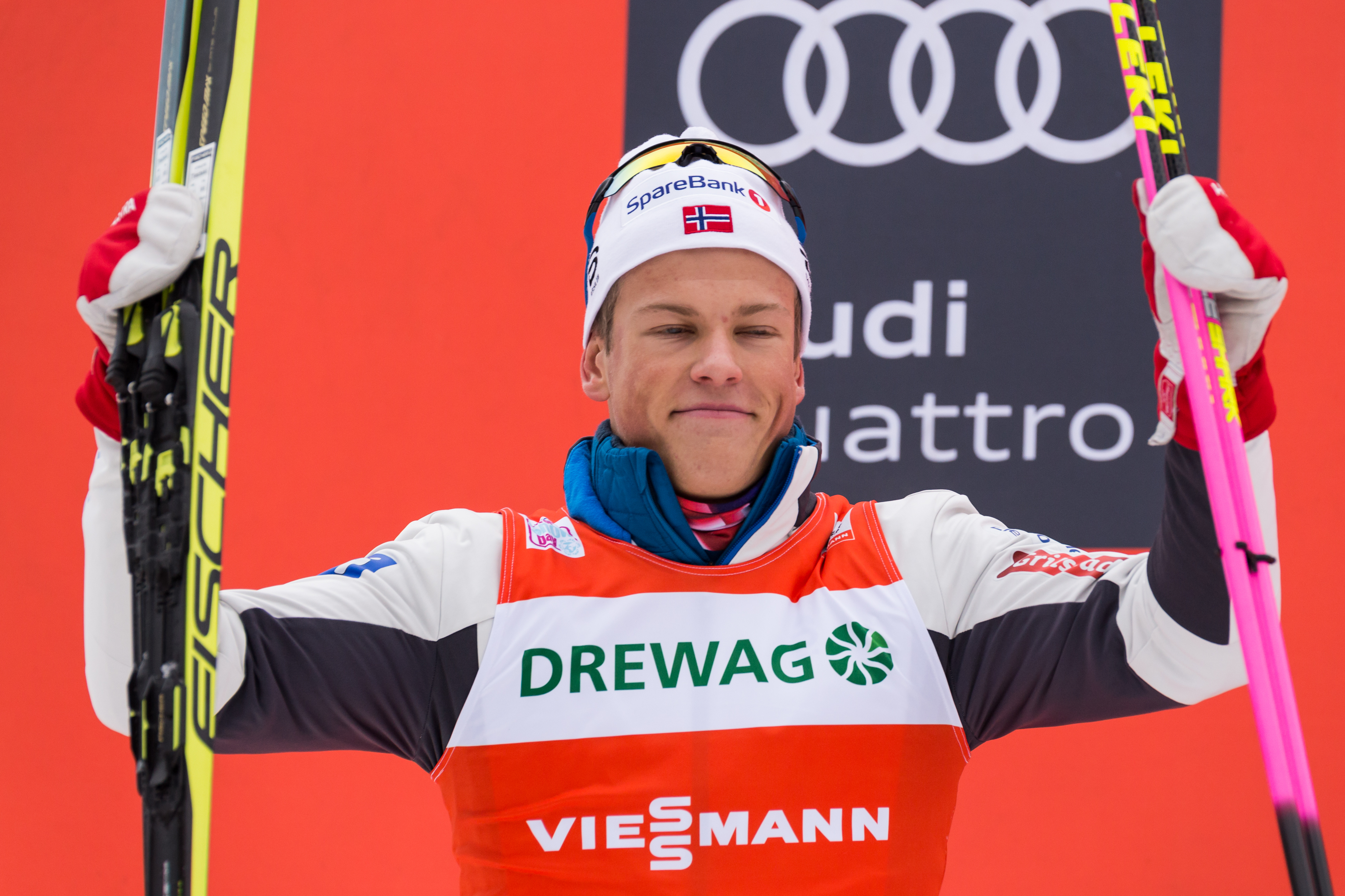 Johannes Hoesflot Klaebo (NOR, Norwegen), Zweitplatzierter, Silbermedaille, silver medal